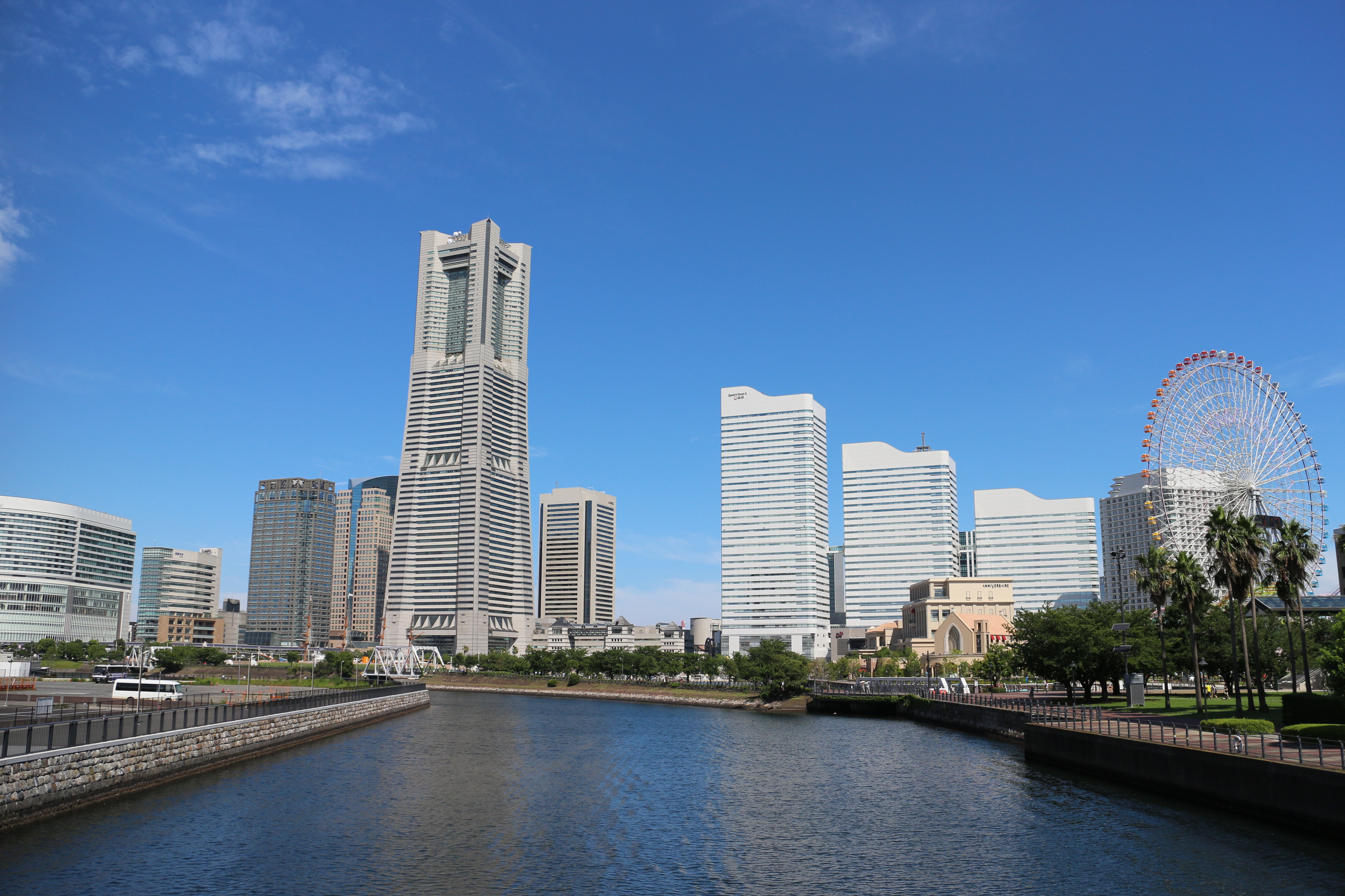 万国橋から見たみなとみらい